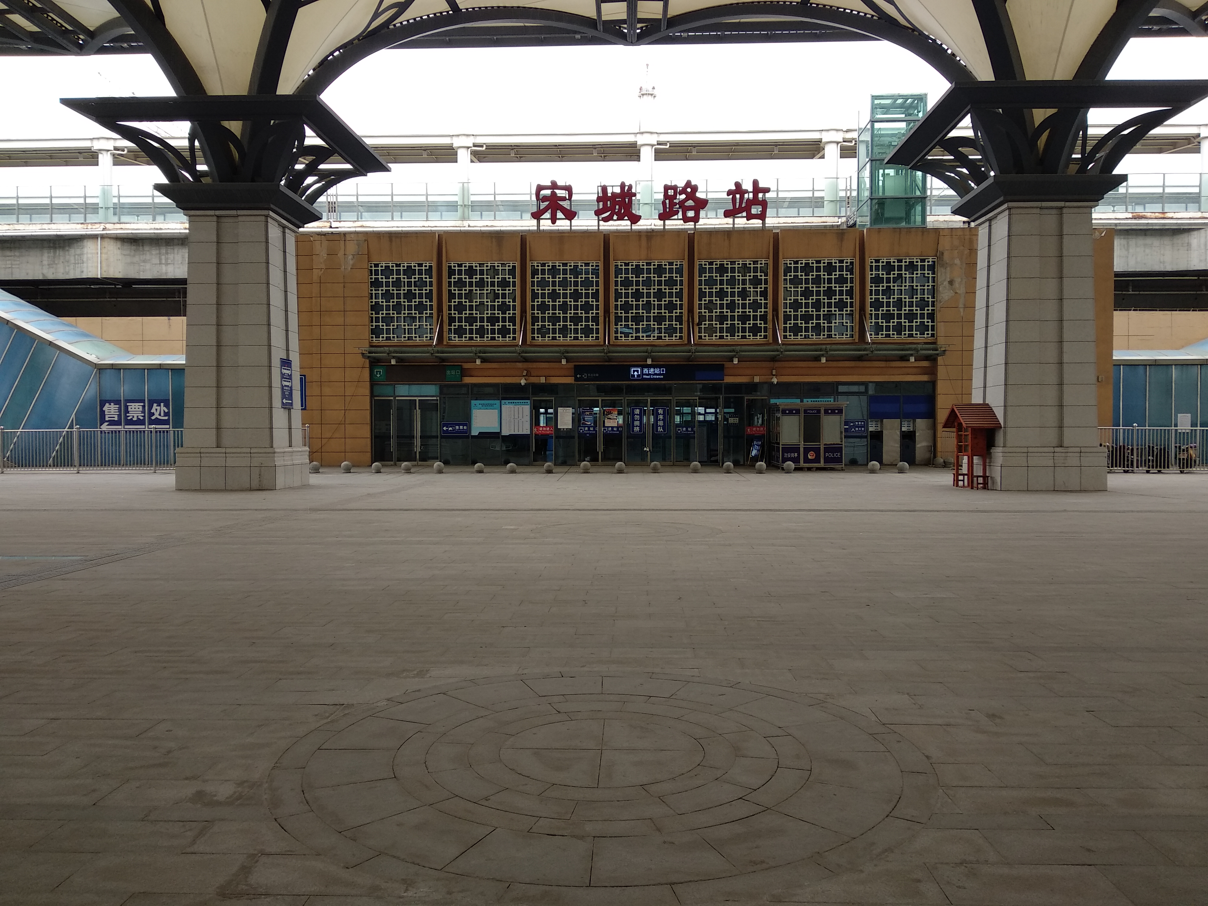 郑开城际铁路宋城路站站房，2018年3月。